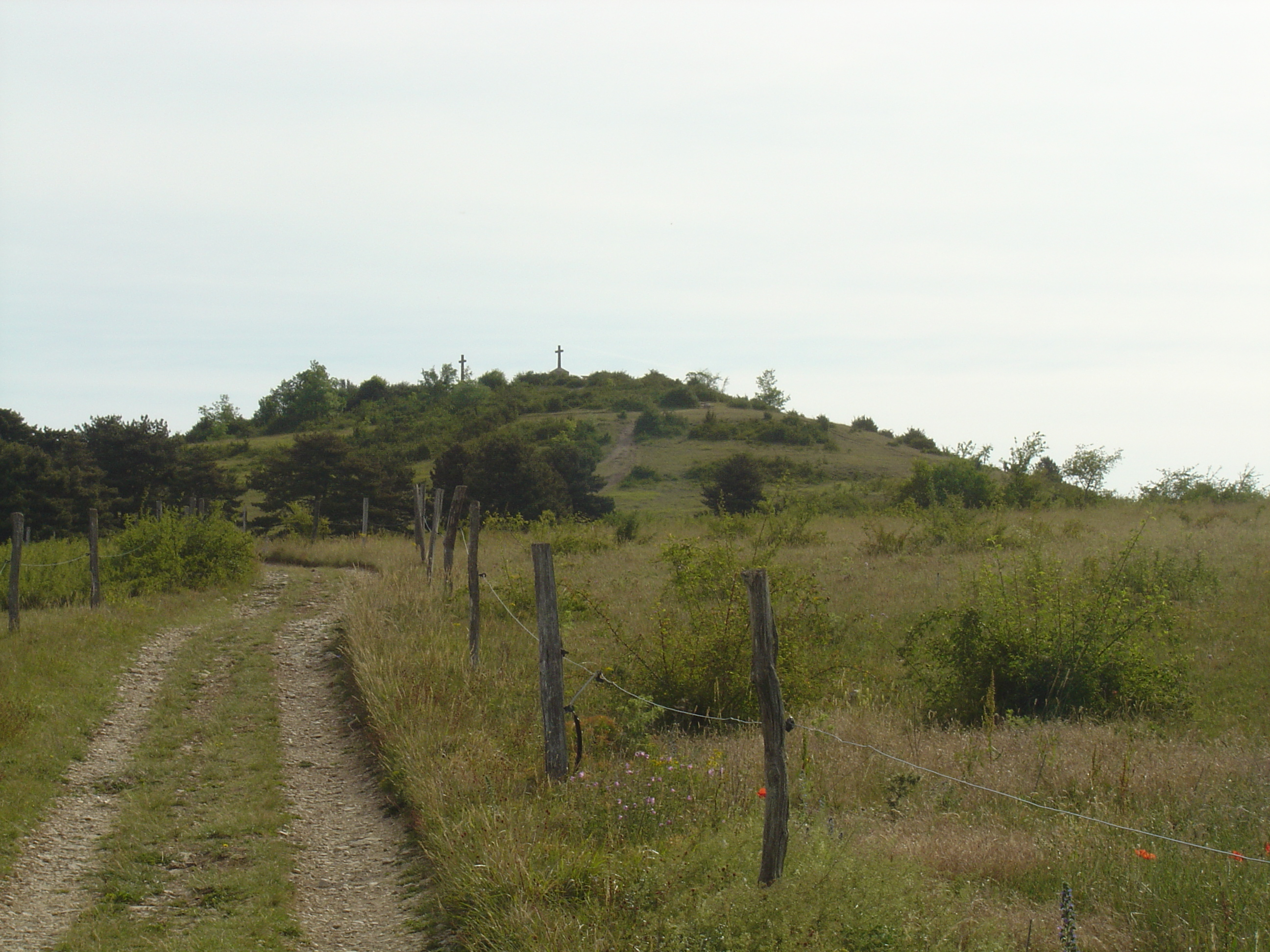 Le Mont Sène (521m), aussi appelé la montagne aux trois croix Bourgogne, à la limite entre la côte d'Or et la Saône et Loire